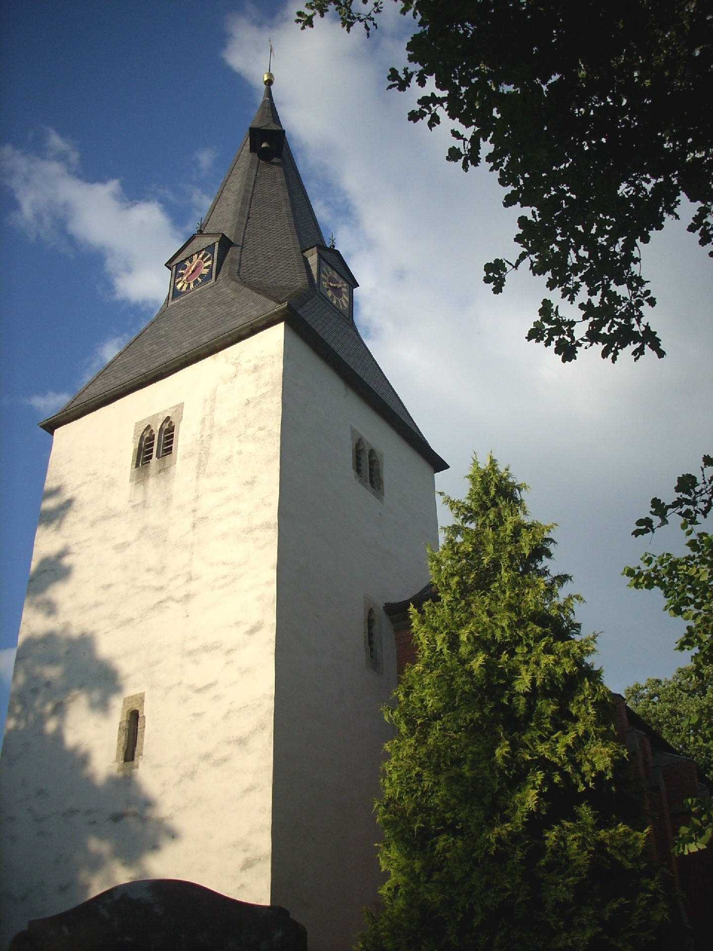 Ev. Kirche Harber, Hohenhameln, Germany